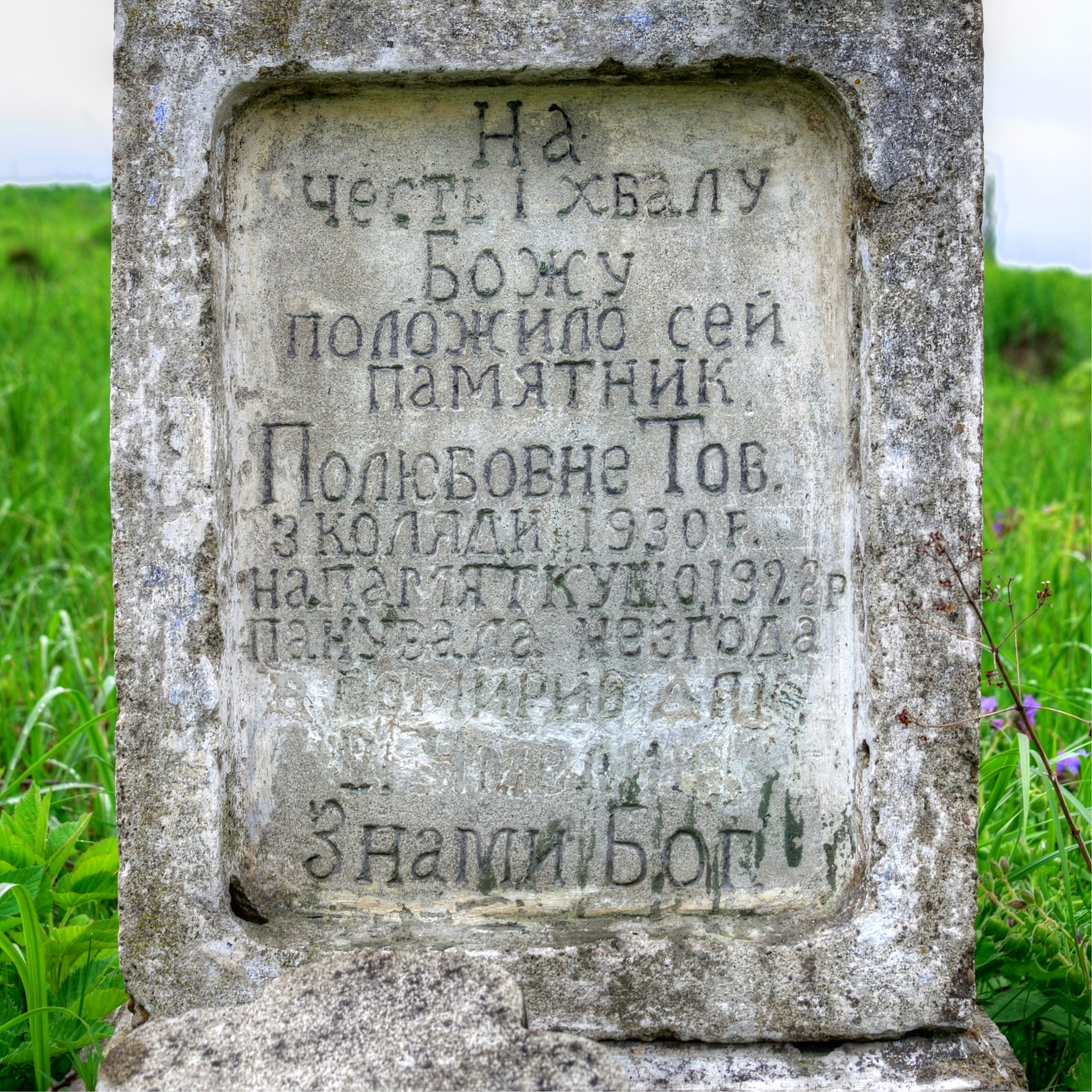 Напис на хресті